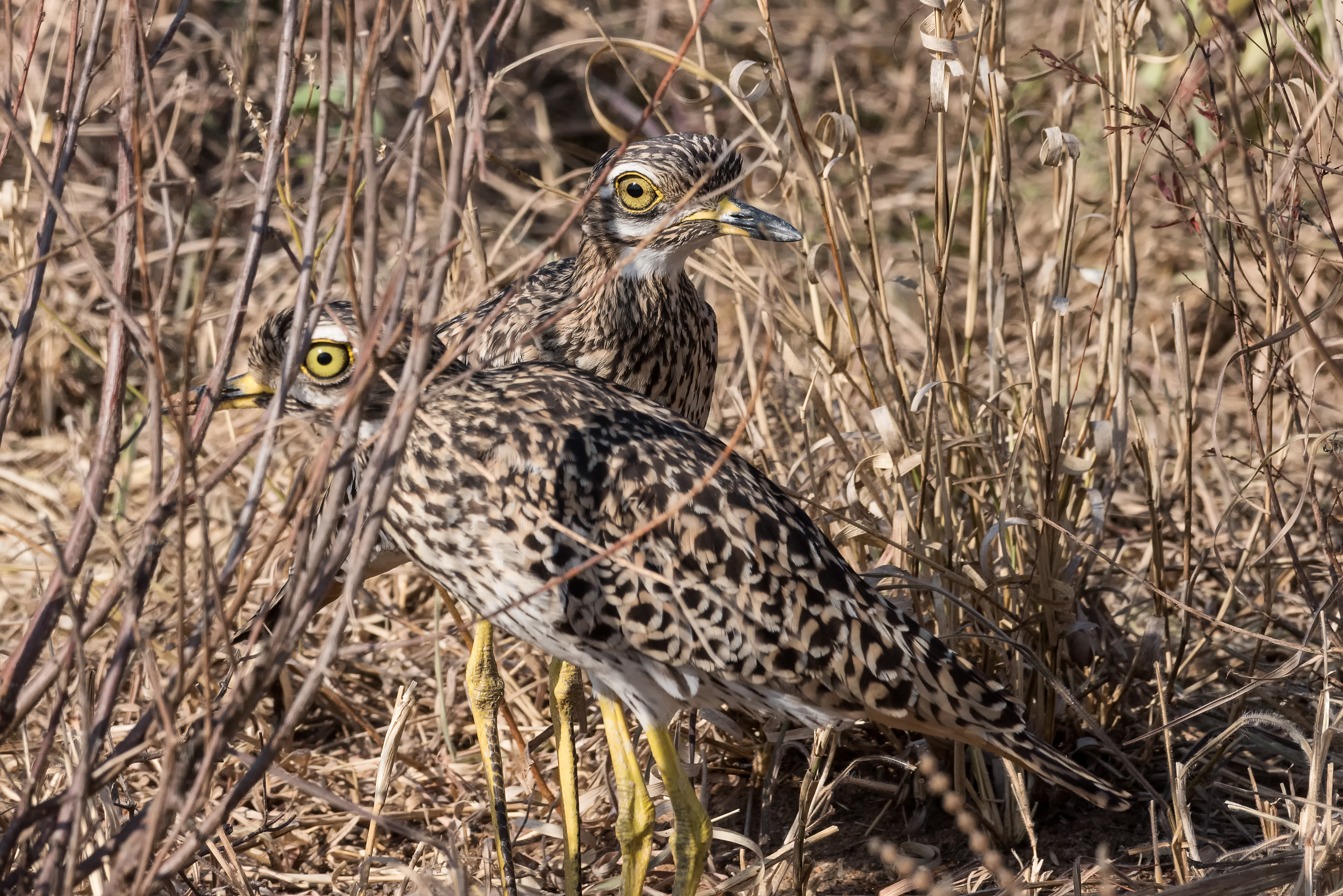 Tarangire National Park, Tanzania